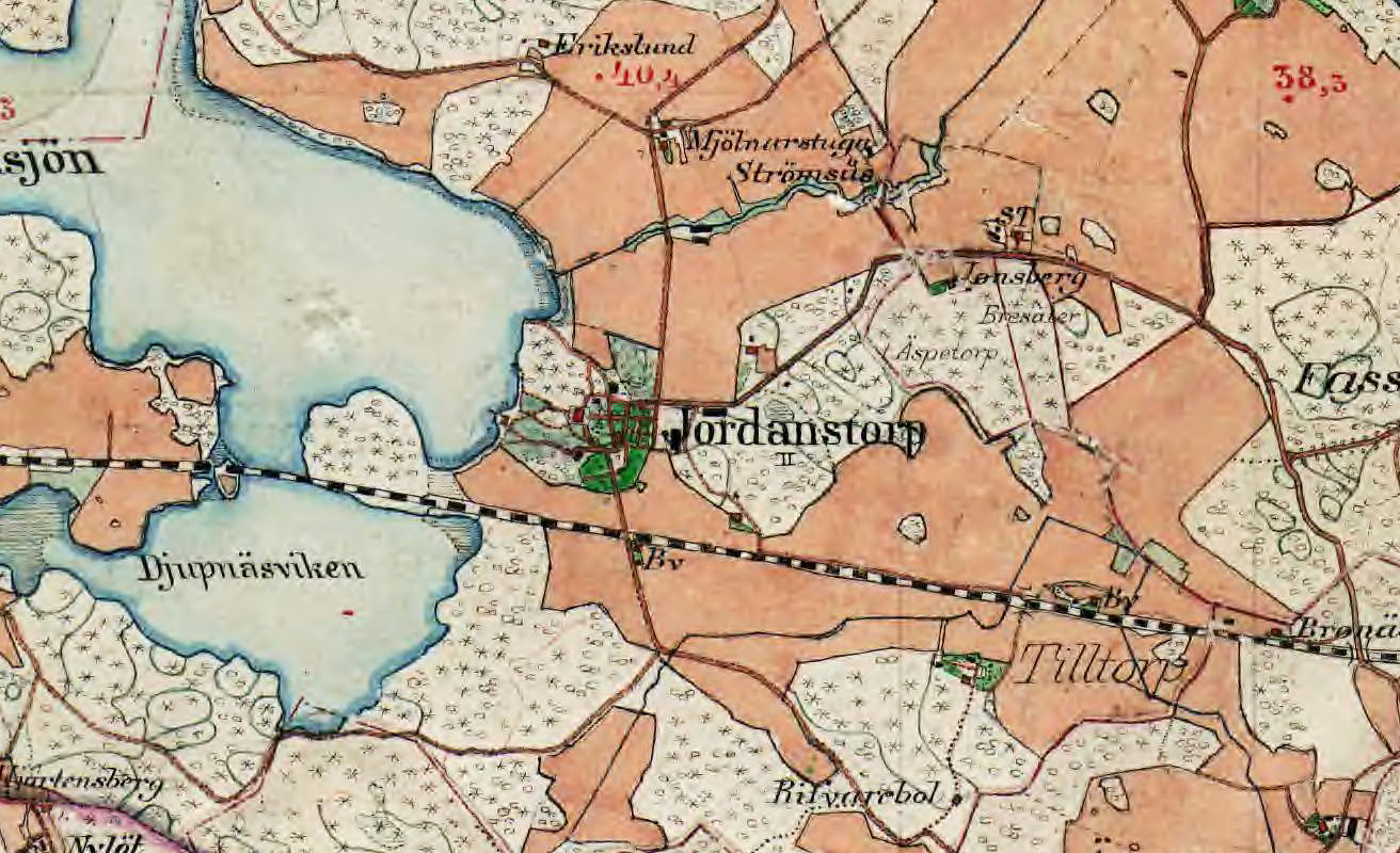 Jordanstorps säteri på Häradsekonomiska kartan